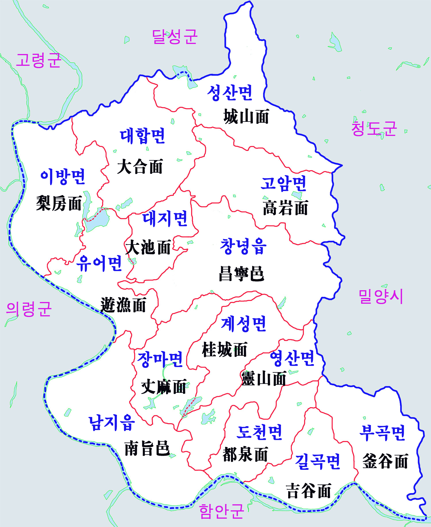 창녕군 행정구역도